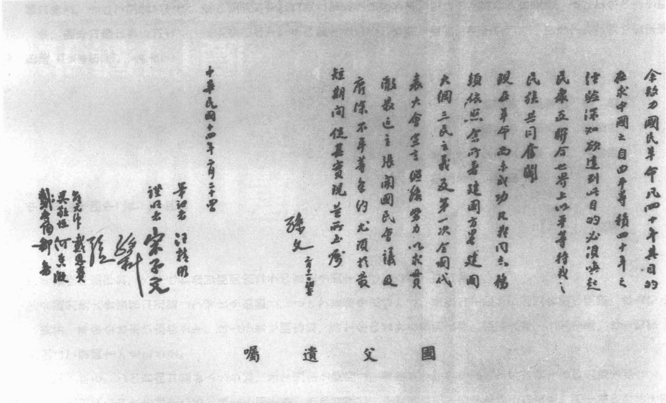 中文（中国大陆）: 孙中山遗嘱